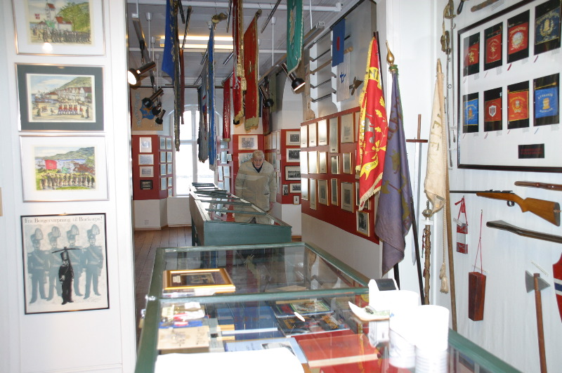 Buekorpsmuseet, Bergen.